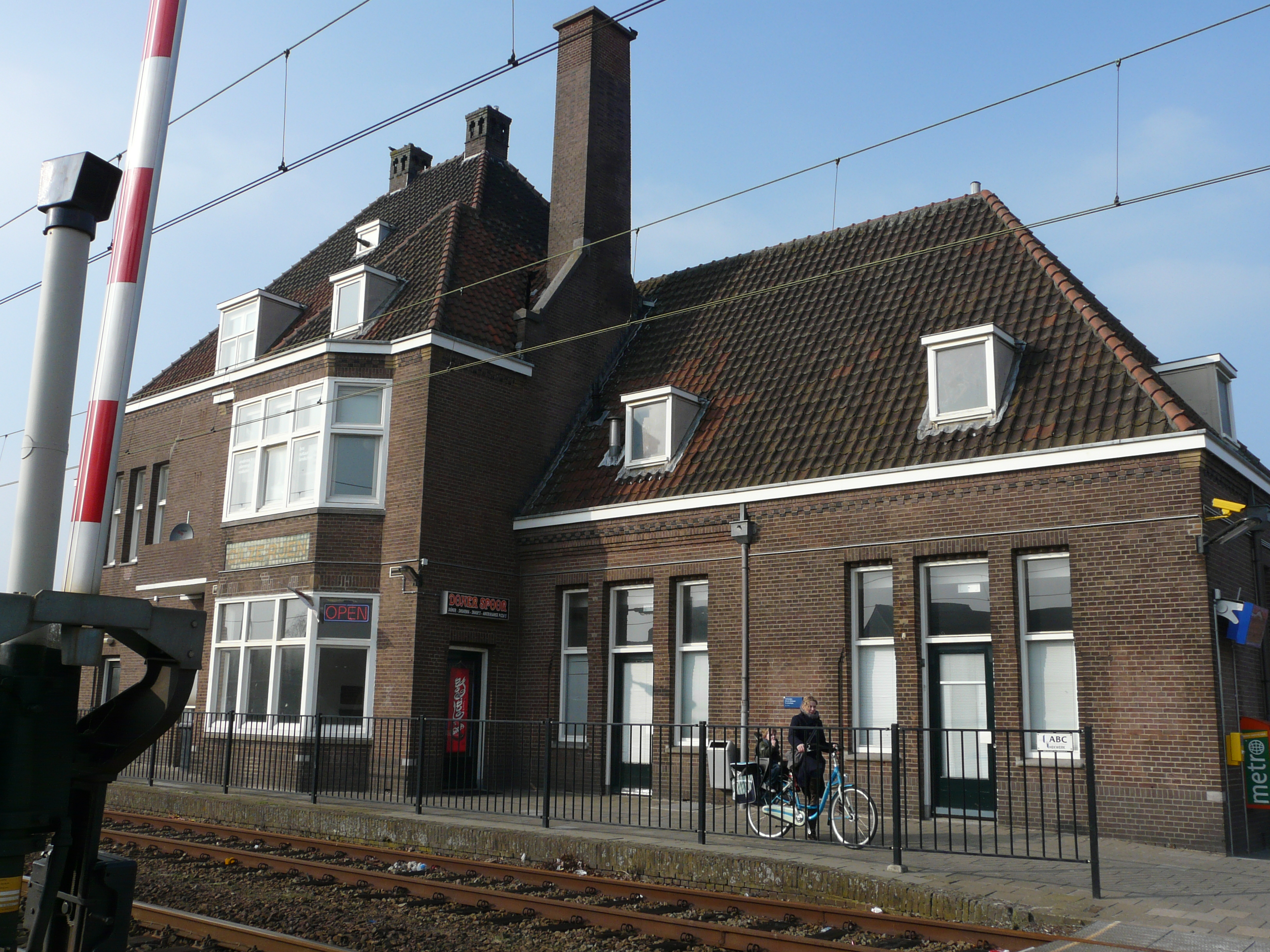 Station Gilze-Rijen in Rijen